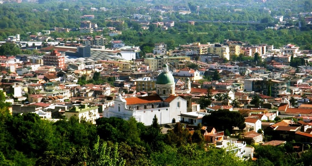 Panorama di Ottaviano (Italia),elaborazione mia.